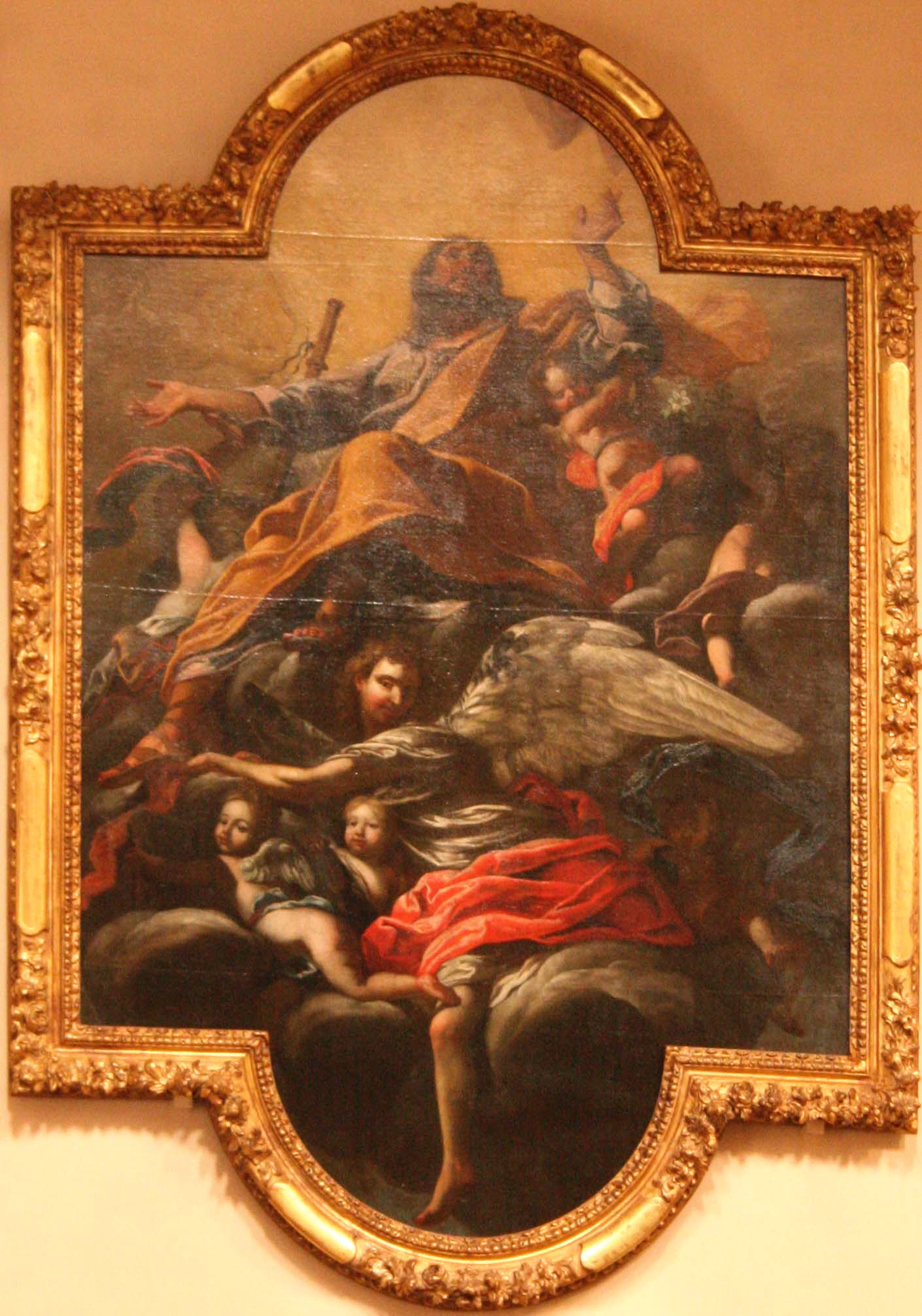 Tableau de Michel Serre (1658-1733) représentant l'apothéose de saint Roch placé dans l'église de Mazargues de Marseille.